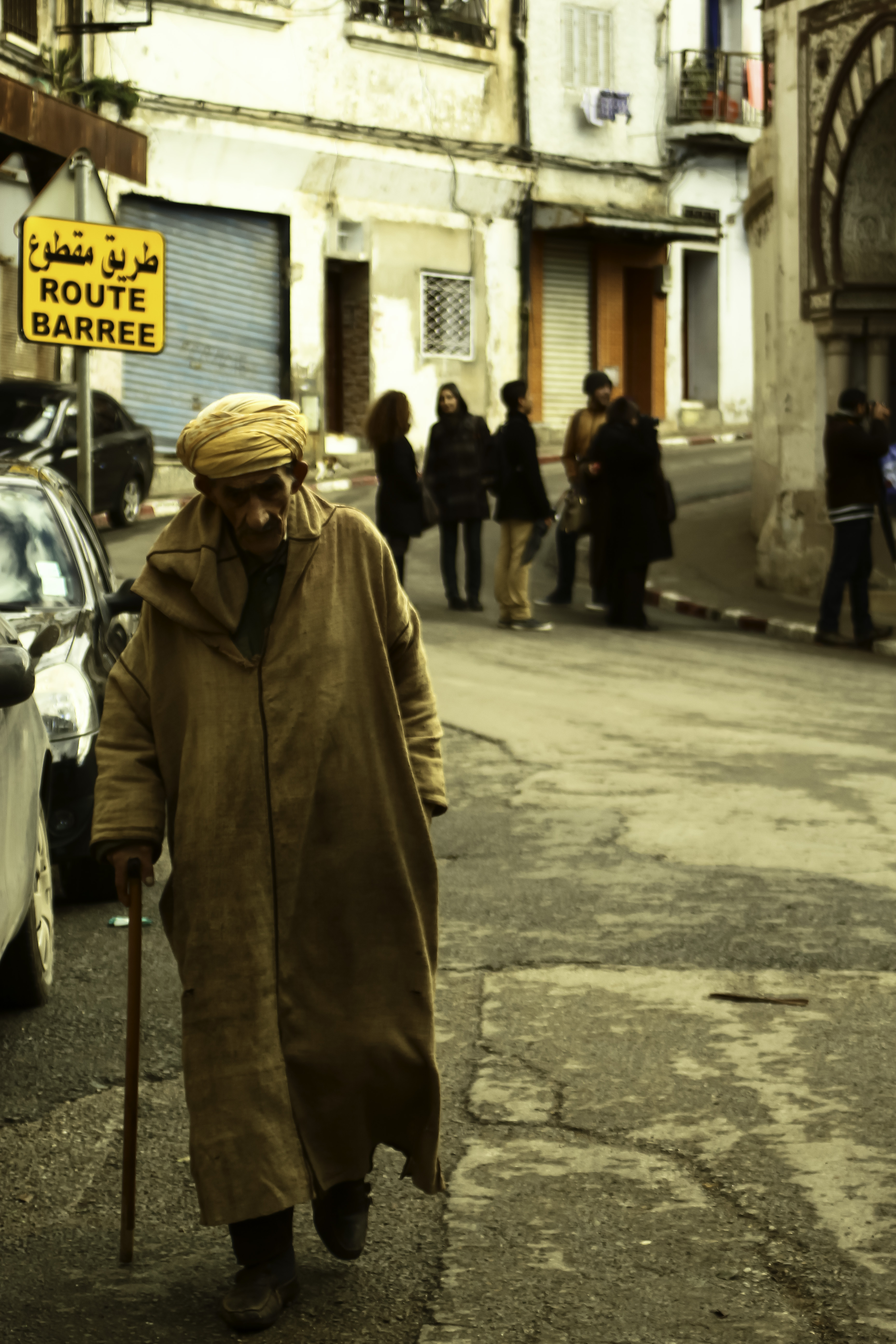 Photo prise au vieux quartier de Sid El Houari à Oran montrant un vieillard vêtu d'une Jelaba This is an image of Cultural Fashion or Adornment from Algeria